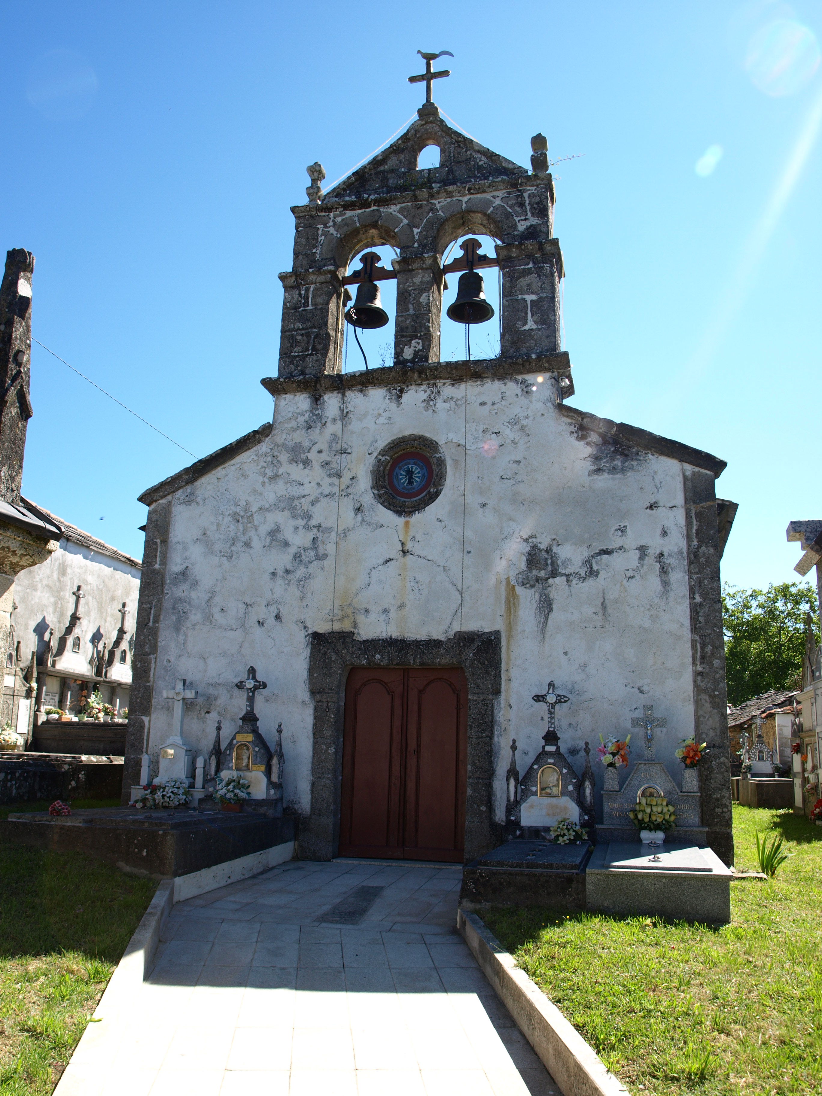 Igrexa parroquial de Segán (O Saviñao)